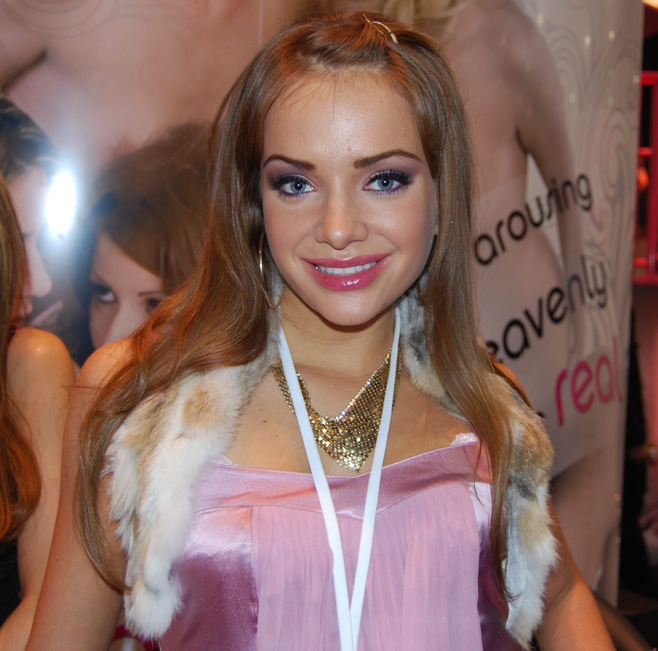 AEE2008_Nikon_Day2 270